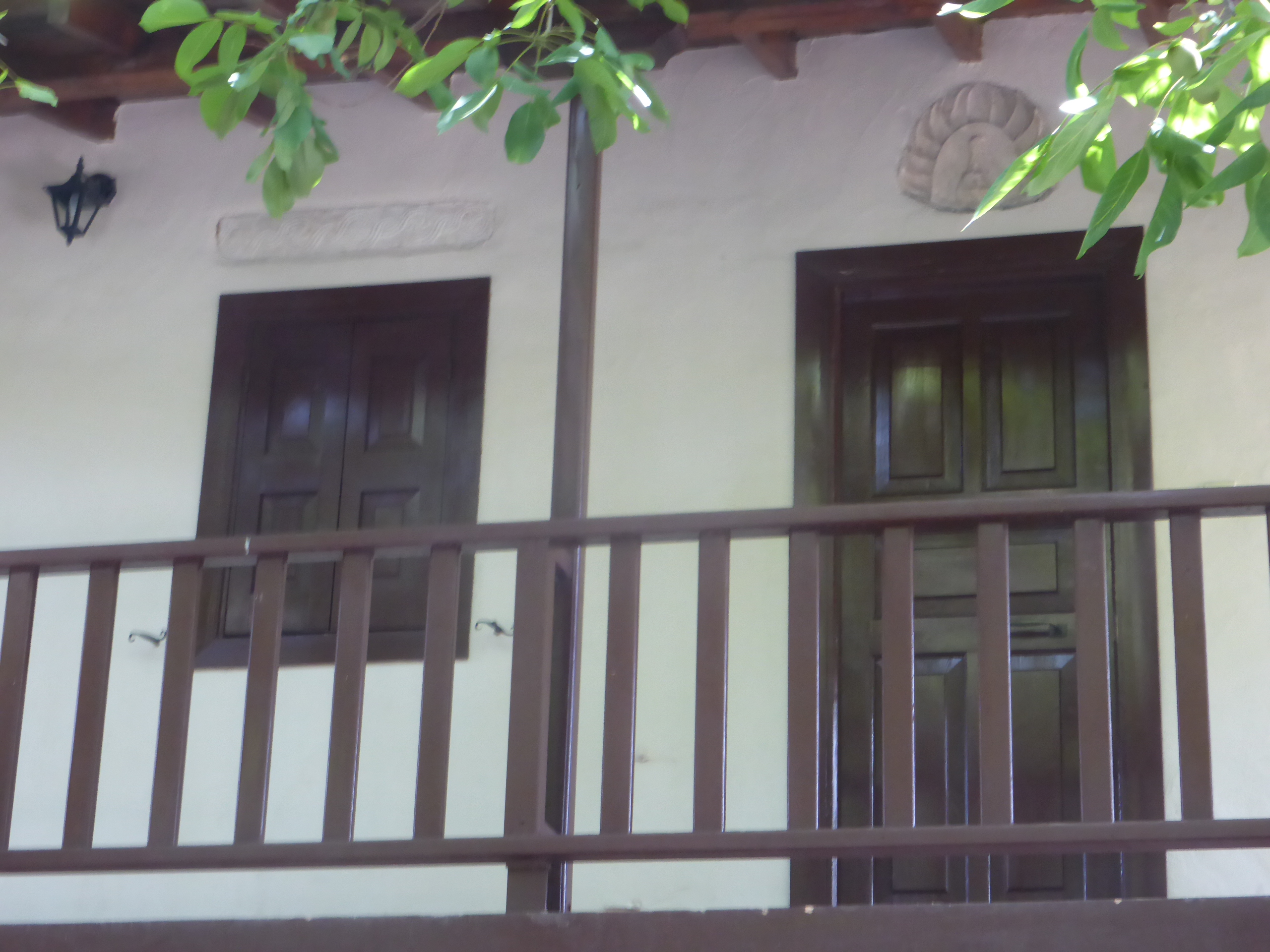 Agii Anargyri, Athen: Historische Klosterzellen